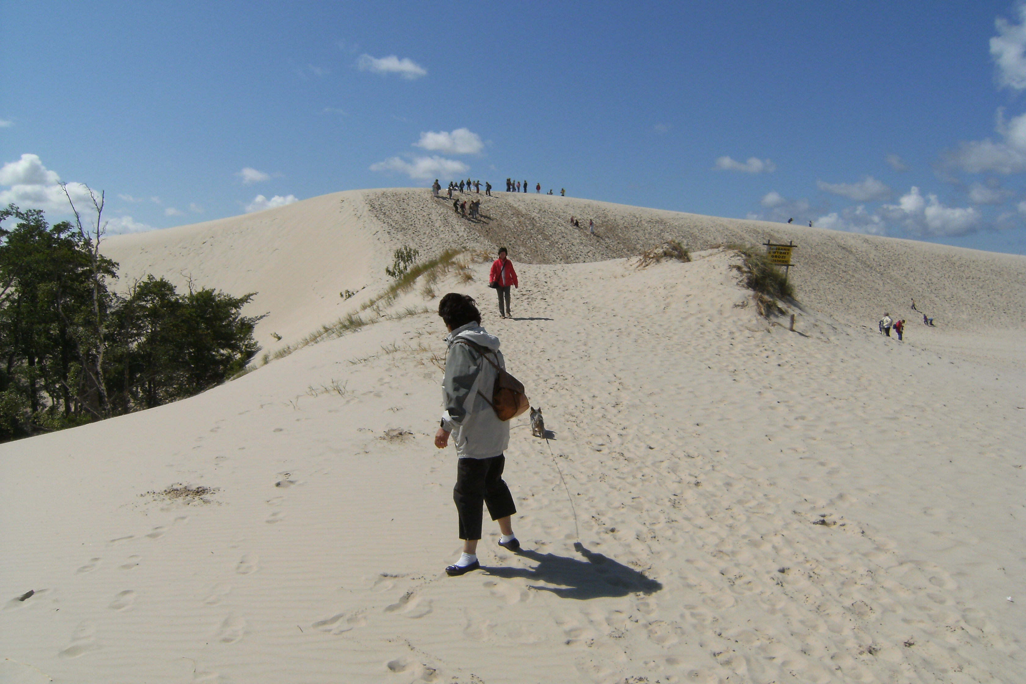 Aufgang zur Lontzkedüne von Leba her